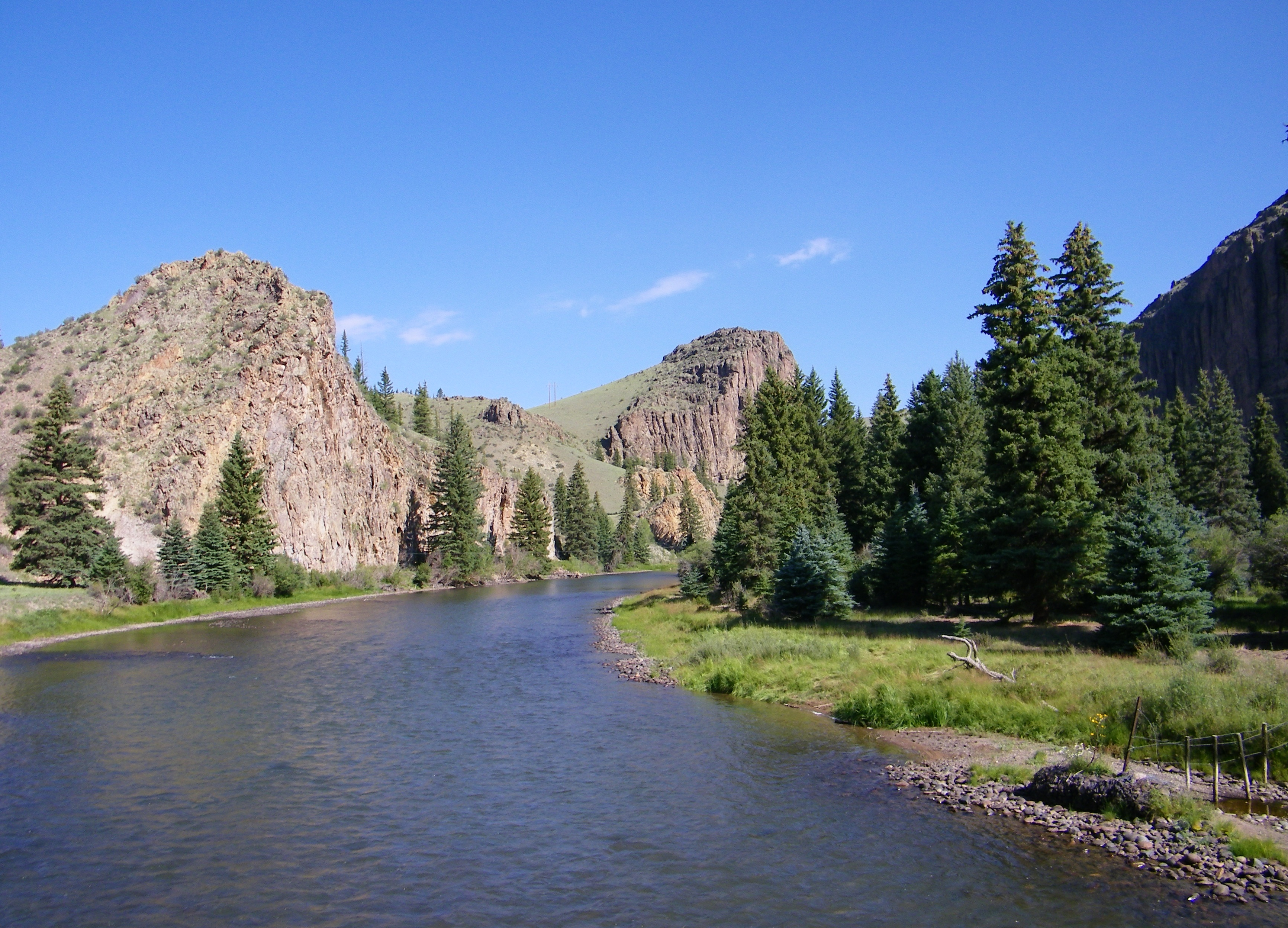 Rio grande below Creede, Colo